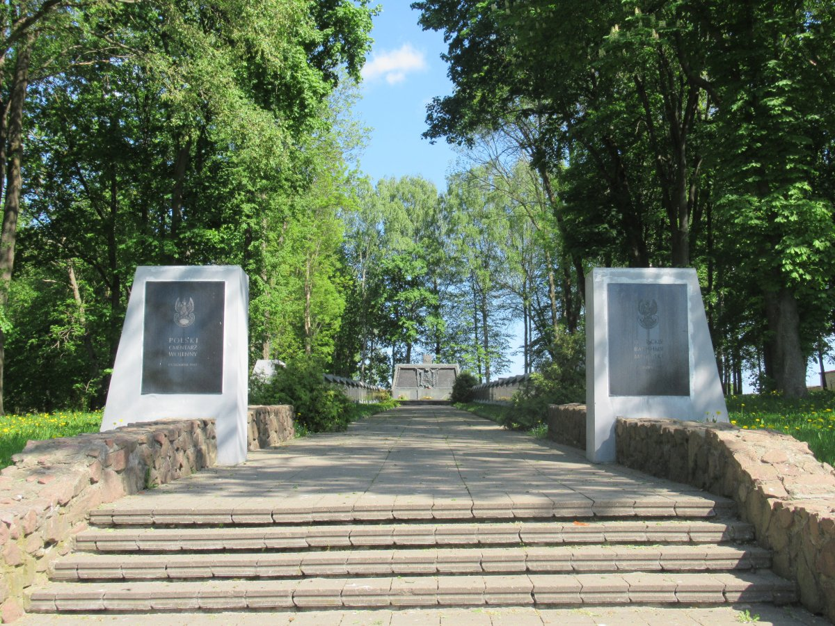 Музей савецка-польскай баявой садружнасці ў аграгарадку Леніна Горацкага раёна Магілёўскай вобласці Беларусі